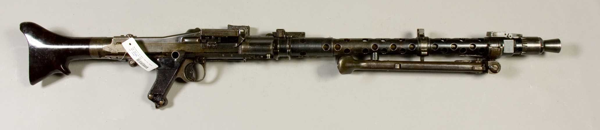 Kulsprutegevär m/1934.